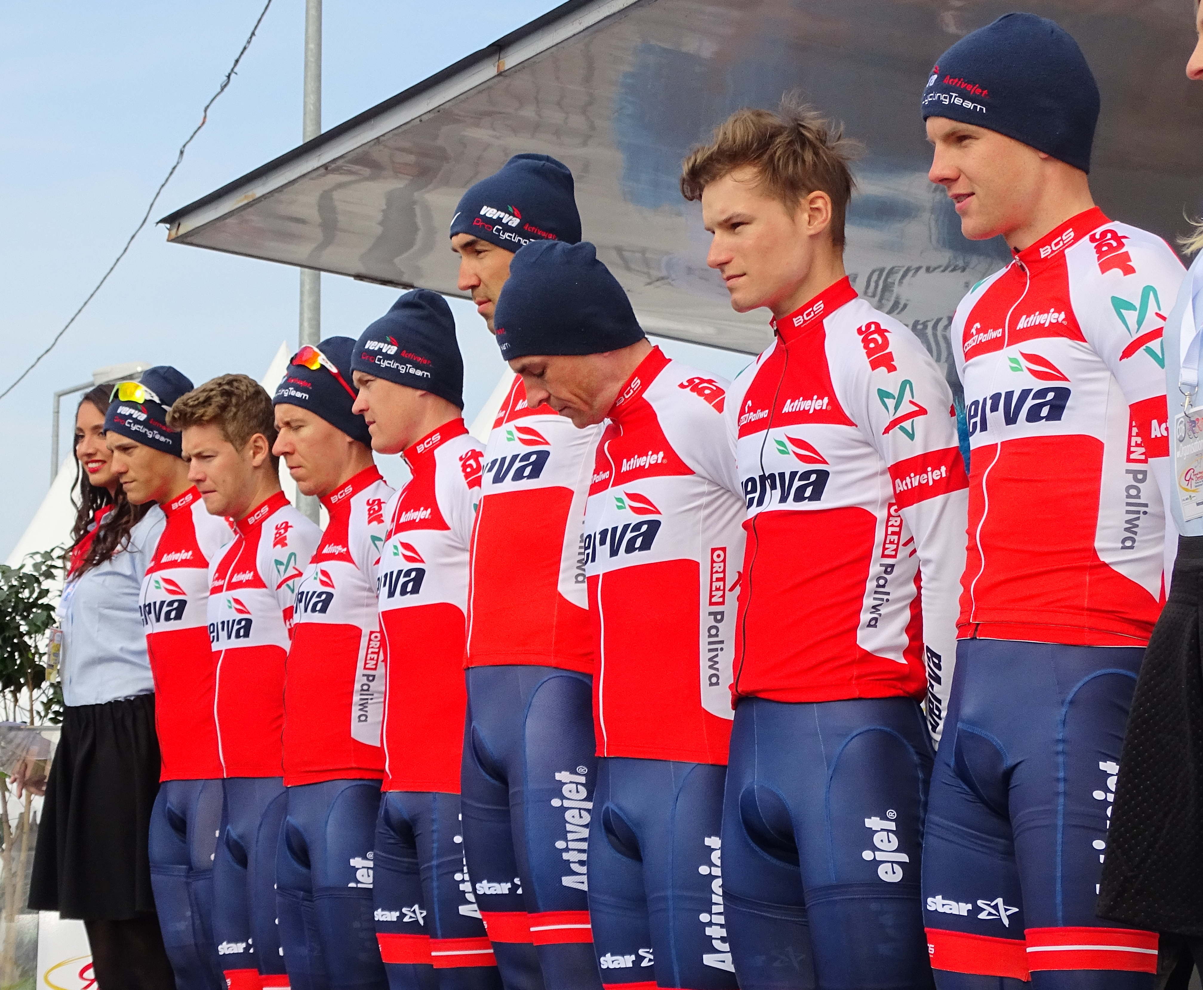 Reportage réalisé le jeudi 14 avril à l'occasion du départ et de l'arrivée du Grand Prix de Denain 2016 à Denain, Nord, Nord-Pas-de-Calais-Picardie, France.